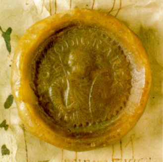 Otto I., Königssiegel, Marburg, Hessisches Staatsarchiv, Urkunde R I a Fulda, Stiftsarchiv 936 Oktober 14, aus: Bernward von Hildesheim und das Zeitalter der Ottonen, 1993, 2, II-1 S. 17 (R. Kahsnitz).